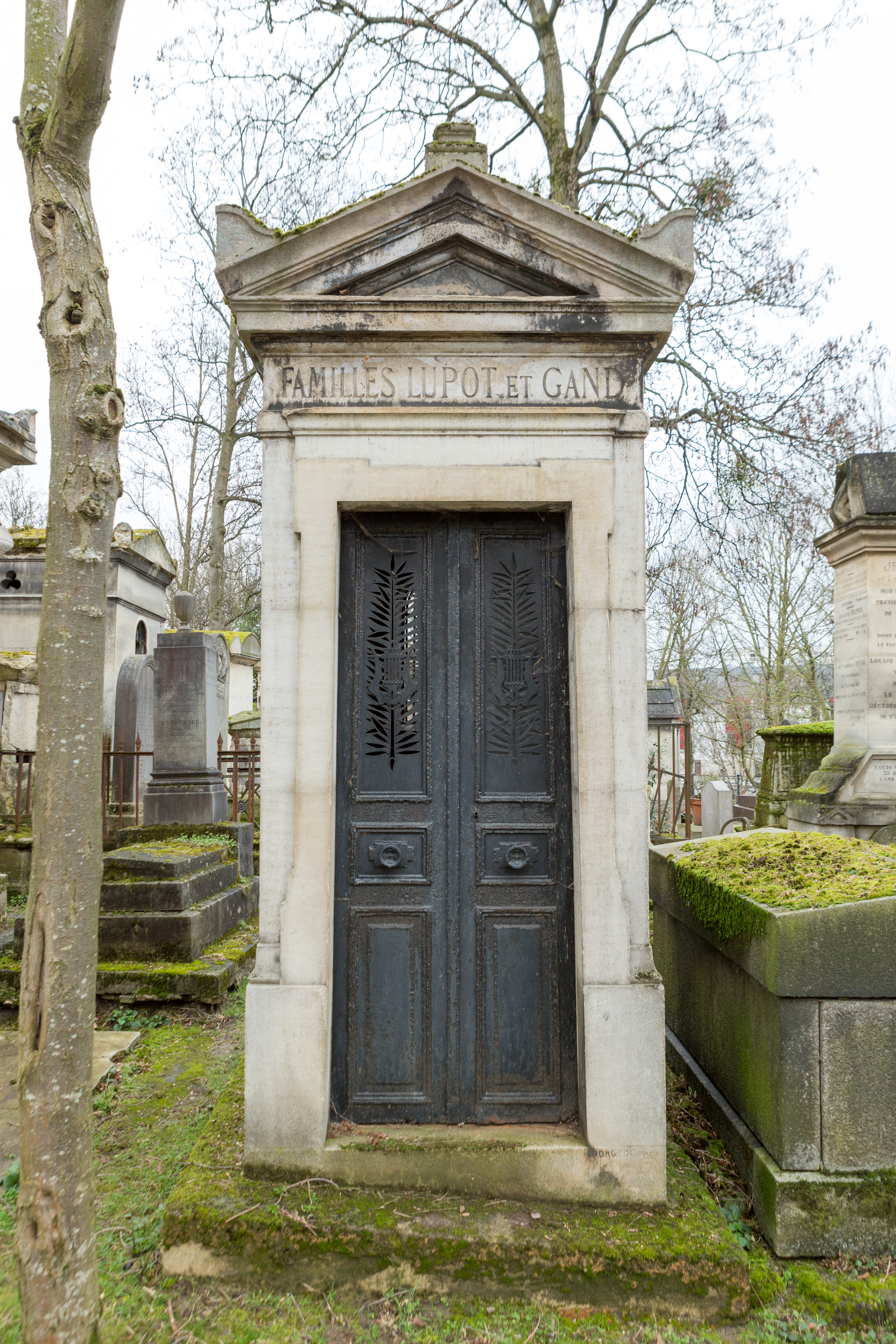 Sépulture des luthiers Nicolas Lupot (1758-1824), Charles-François Gand (1787-1845) et ses fils Charles-Adolphe Gand (1812-1866) et Charles-Nicolas-Eugène Gand (1825-1899).